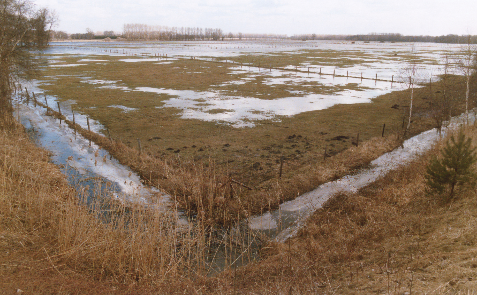 Drömlingswiesen bei Brechtorf (Rühen, Landkreis Gifhorn) bei Schneeschmelze